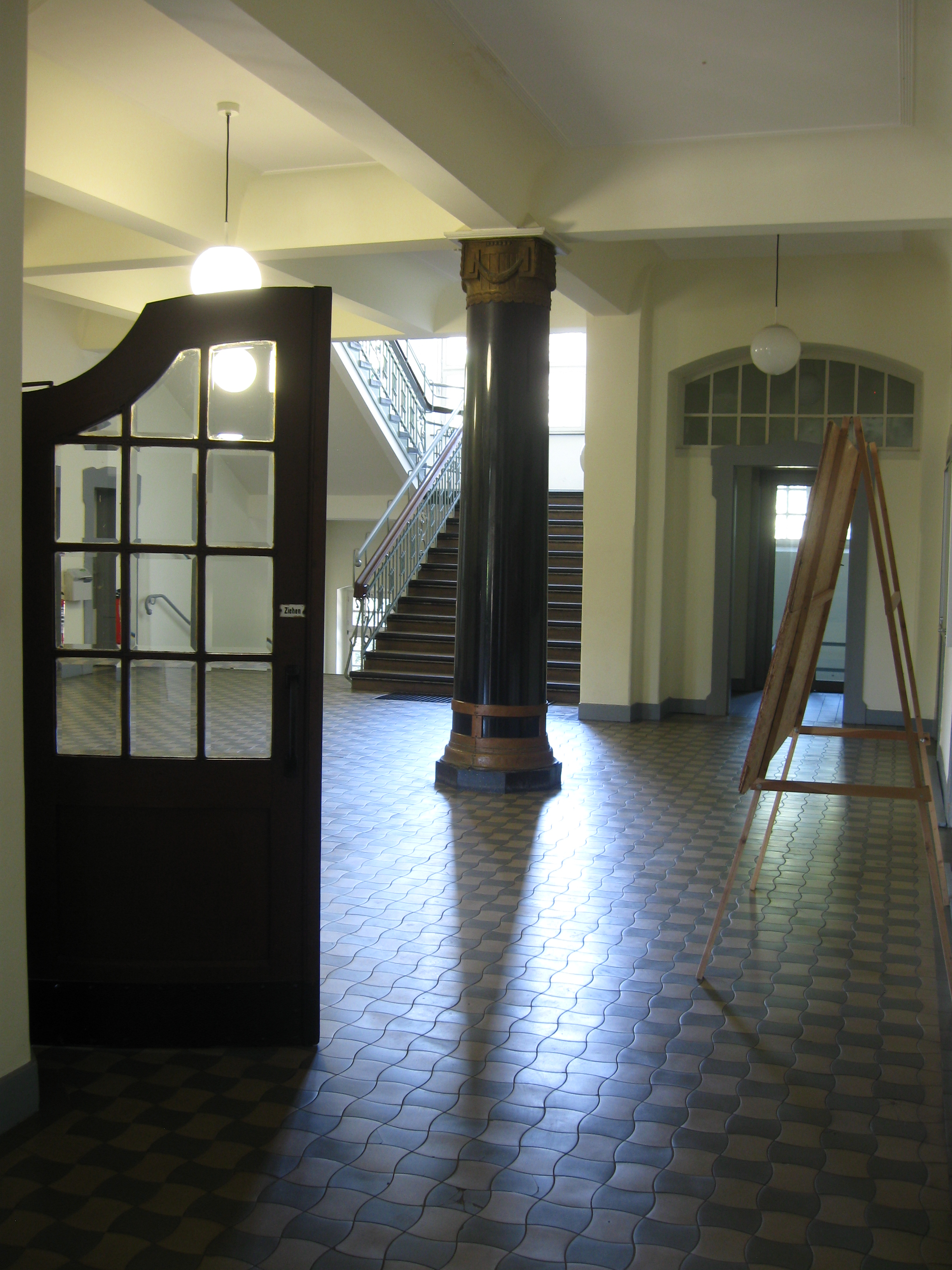 Rathaus Kray, Treppenhaus